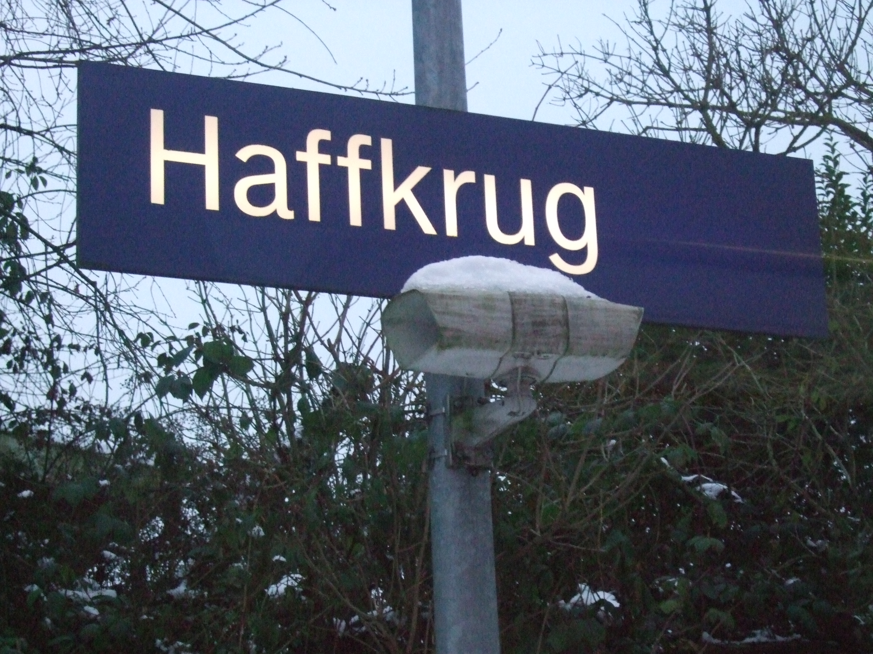 Bahnhof Haffkrug in Scharbeutz, Kreis Ostholstein, Deutschland